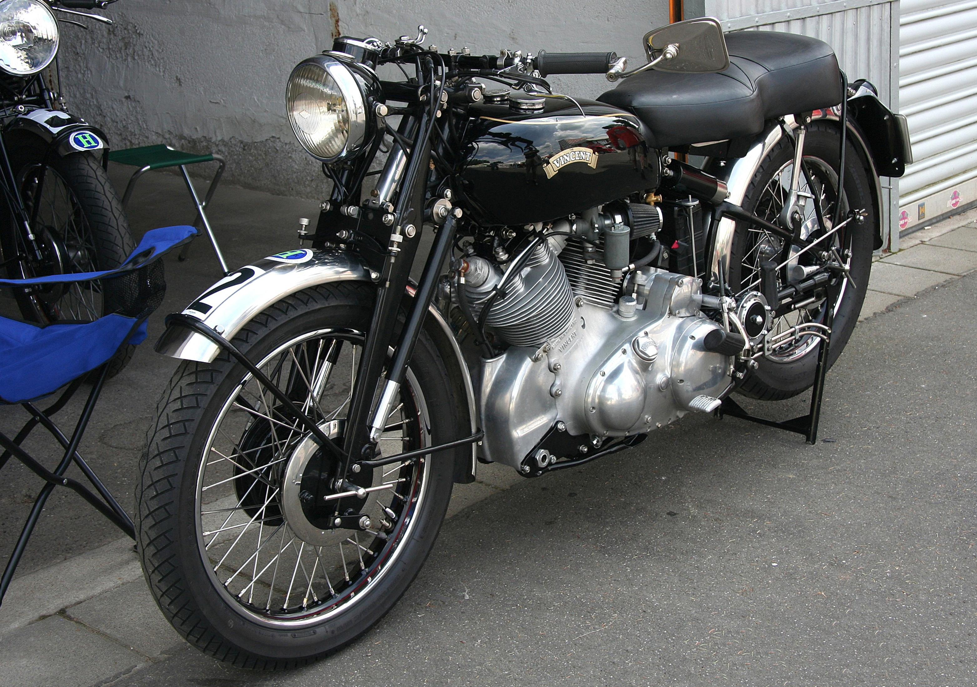 Vincent C Rapide, Baujahr 1952, beim Oldtimer-Grand-Prix des AvD